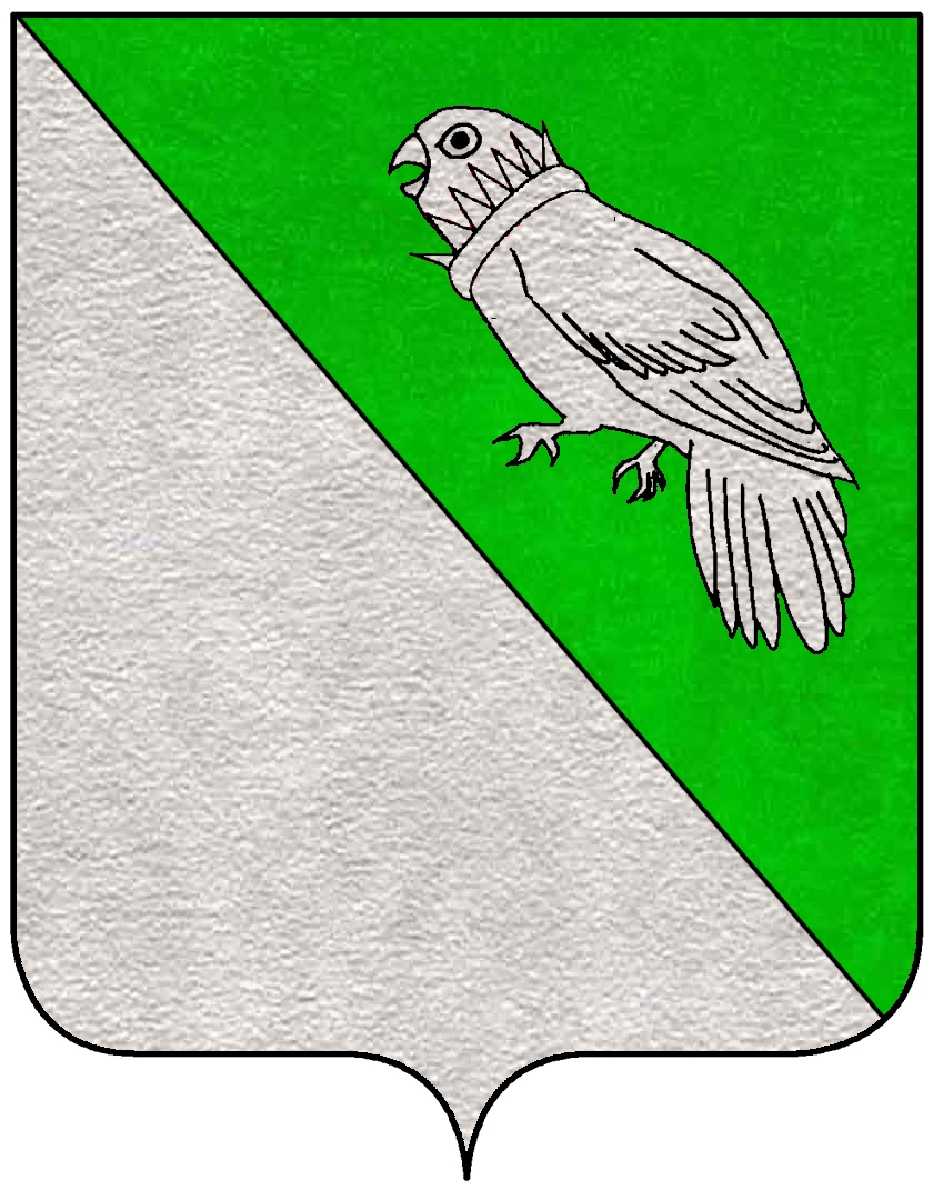 Stemma della famiglia Boldù, appartenente al patriziato di Venezia.